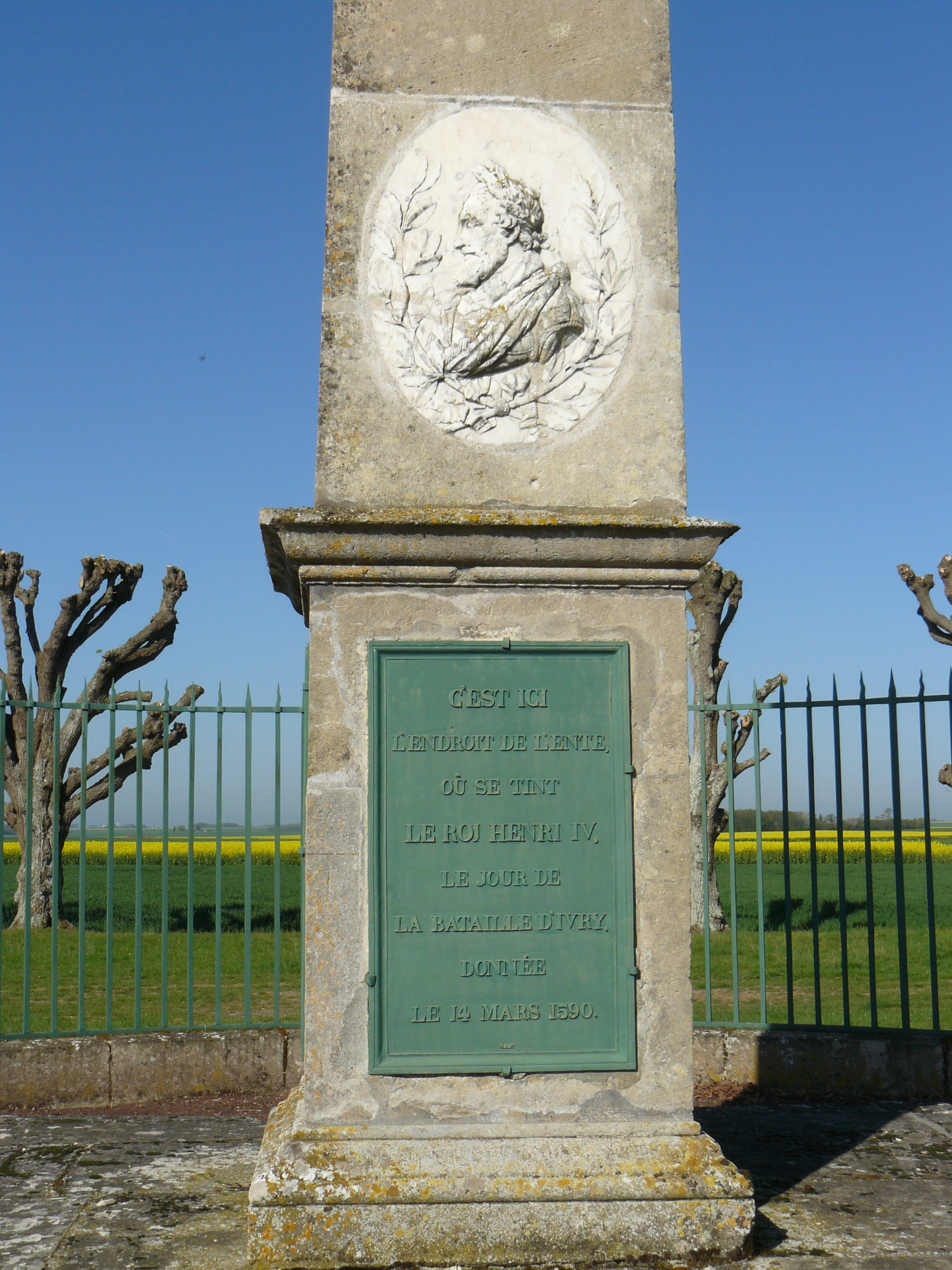 "Pyramide" (obélisque, 1804) commémorative de la bataille d'Ivry (1590) à Epieds (Eure, France). Médaillon à l'effigie d'Henri IV.